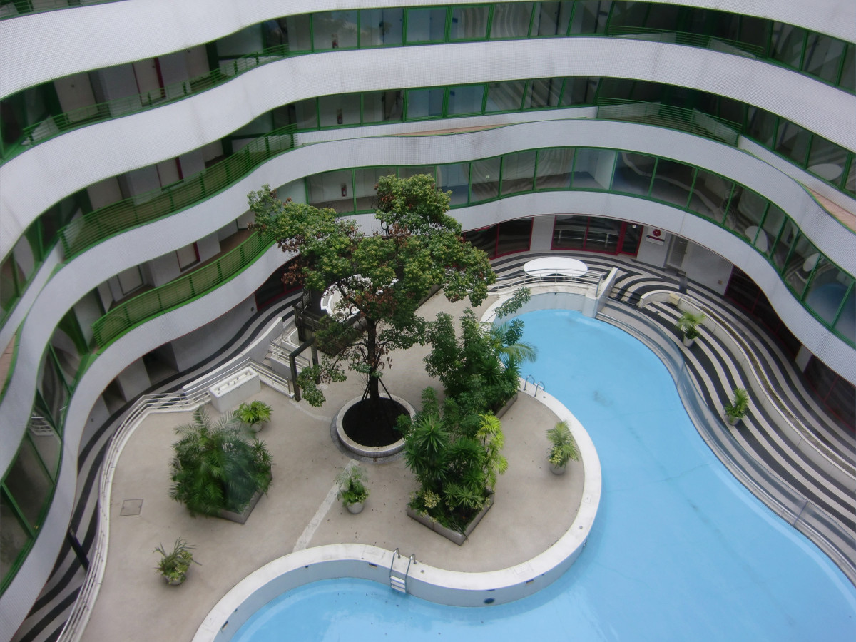 ヴィラフィンテーヌ六本木アネックス（旧六本木プリンスホテル）中庭プール